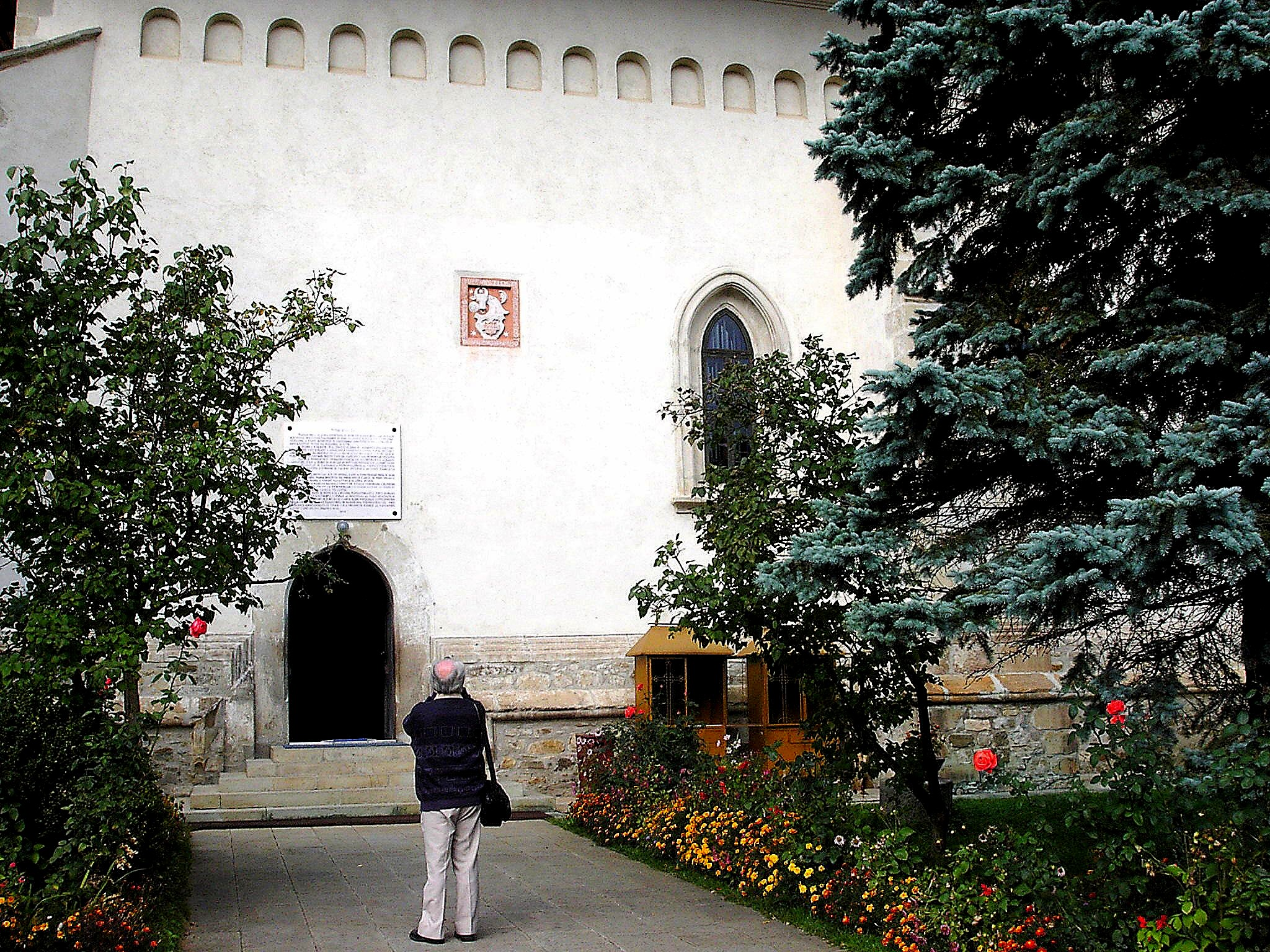 Slatinai kolostortemplom, Románia